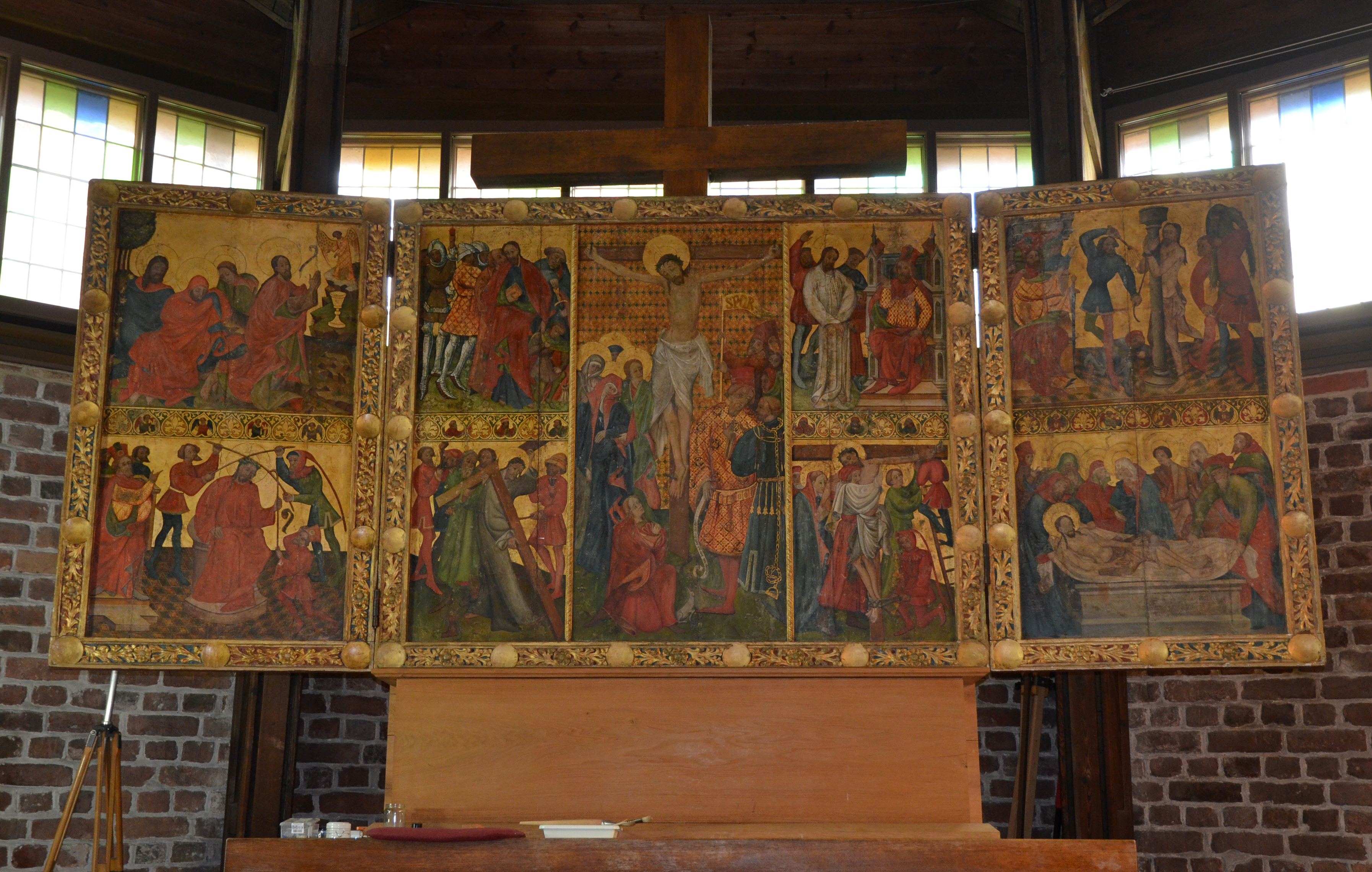 Neue Kirche (Wismar), Passionsaltar